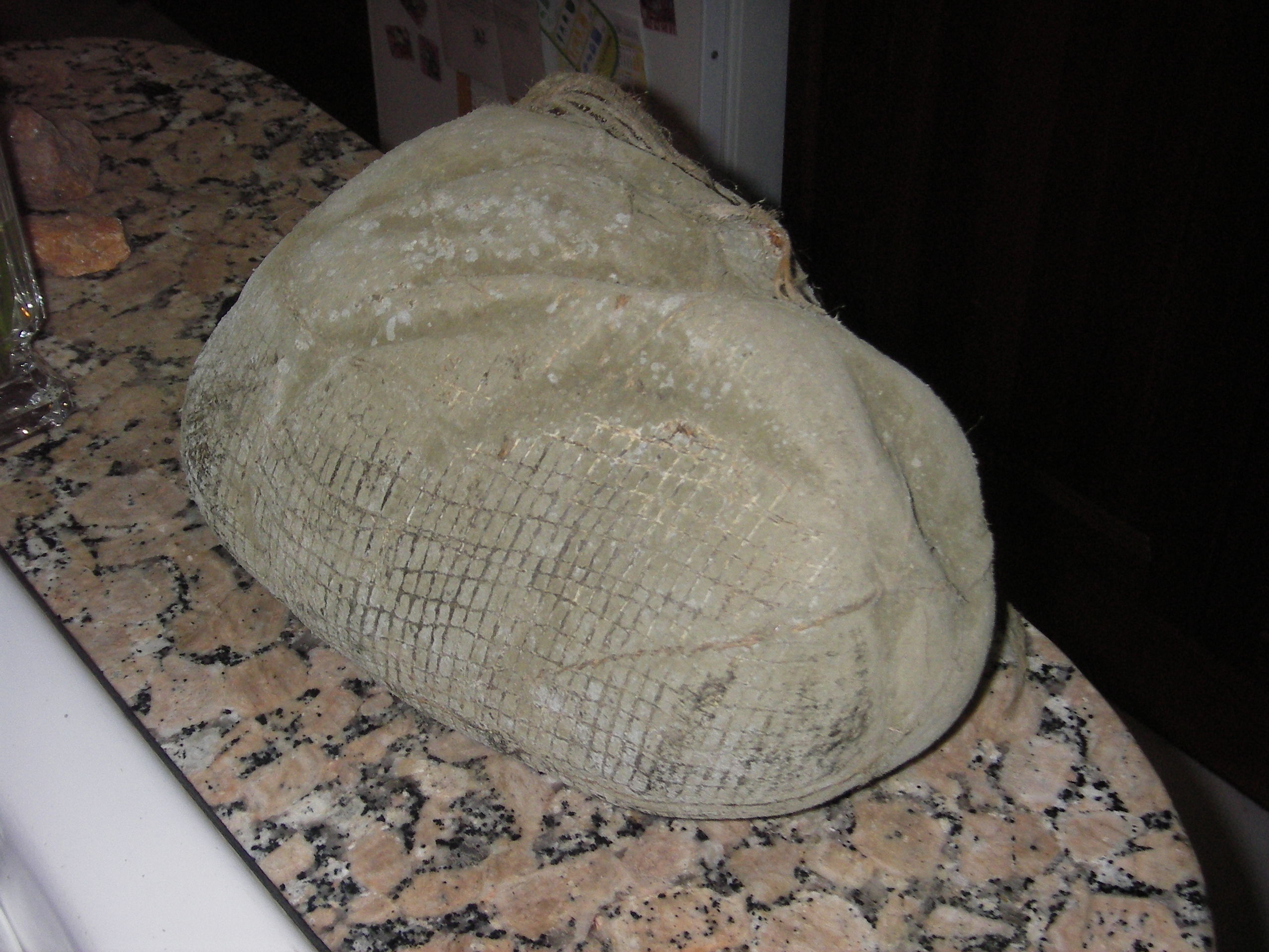 Bisbe (la sobrassda mes grossa del porc), despres d'una curació de 14 mesos.